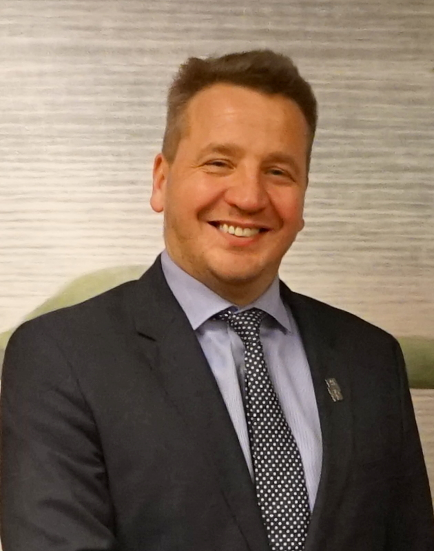 VM Mikser LMNi välisministrite kohtumisel ja kohtumine Islandi VMiga